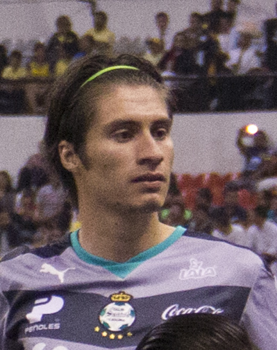 América vs Santos